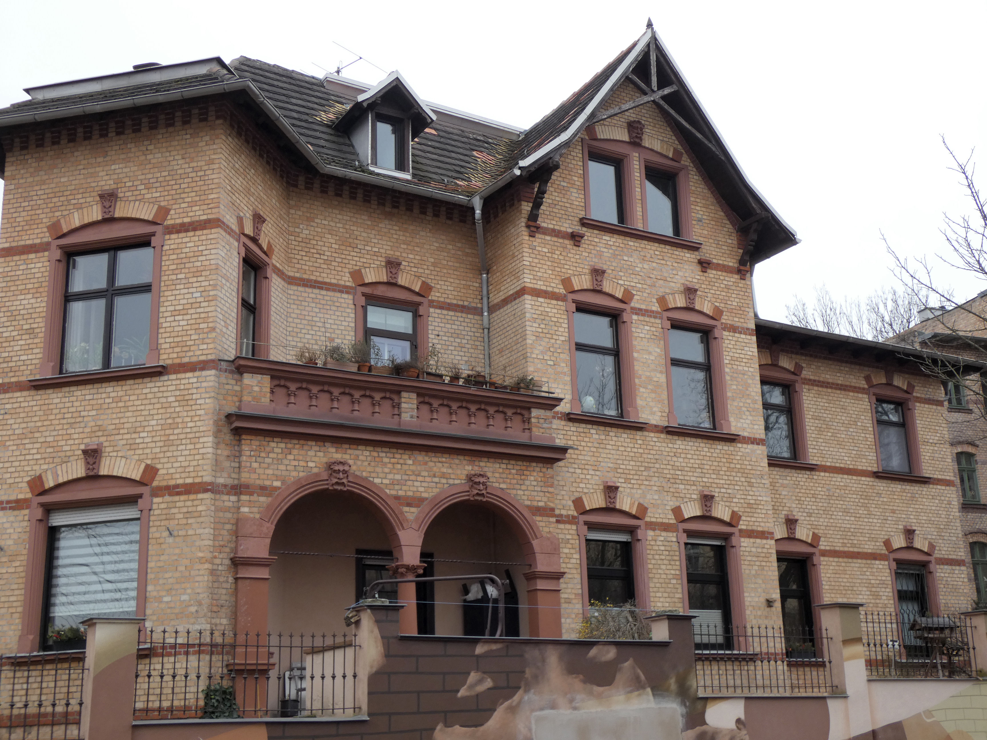 Richard-Wagner-Straße 31, Halle (Saale)